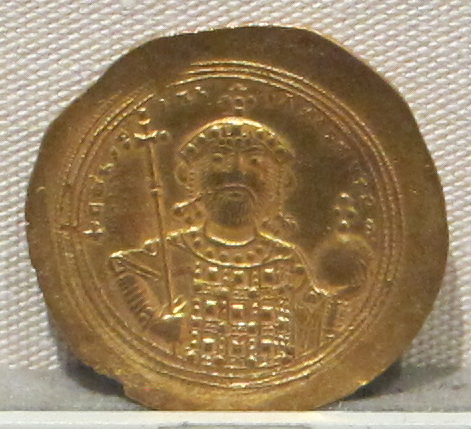 Palazzo Massimo alle Terme